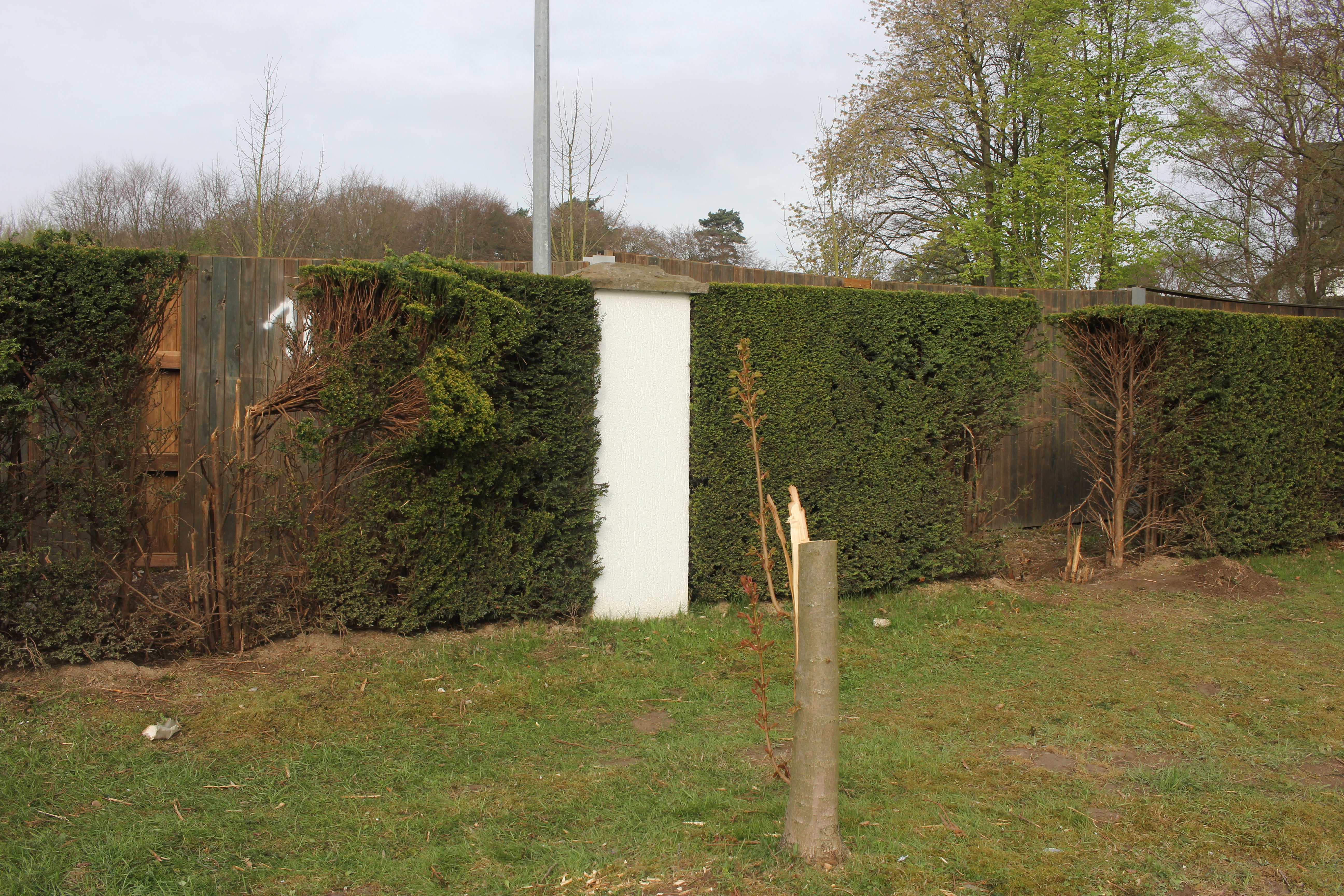 Anschlag auf den Mannschaftsbus von Borussia Dortmund